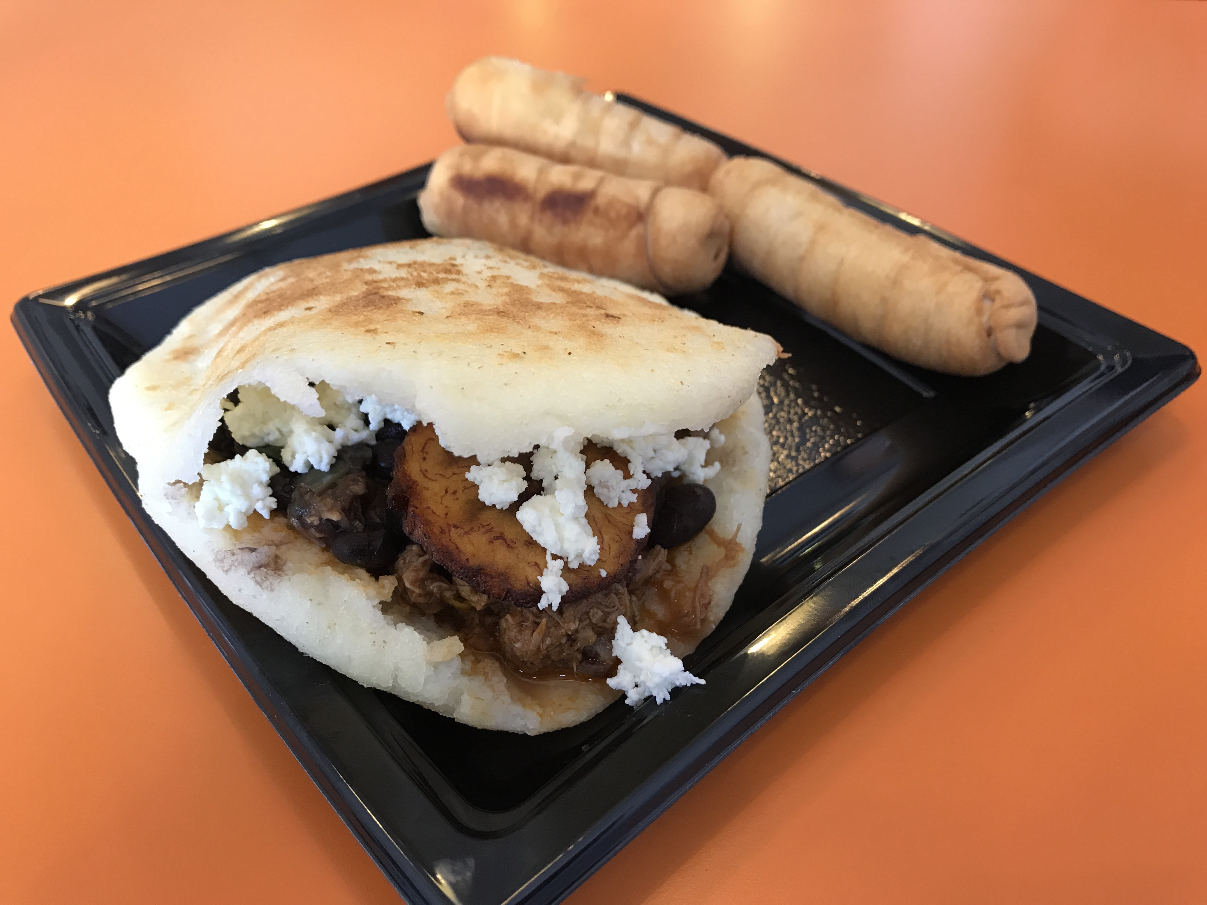 Un sandwich vénézuélien de type arepa accompagné de trois beignets au fromage (tequeños). Photographié au restaurant "Arepado", 246, Cours Lafayette Lyon 69003 lors d'un repas partagé avec l'ami Seb.